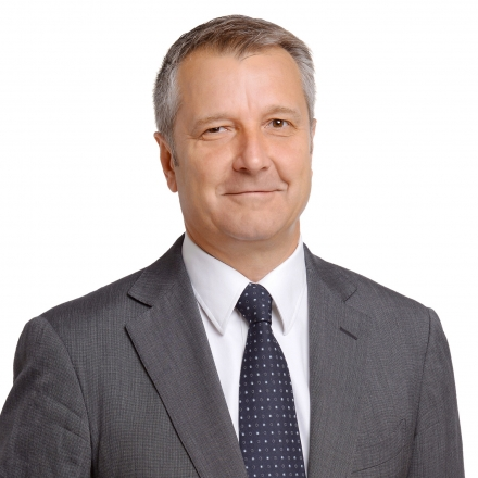 Molnár Gyula (Budapest, 1961. augusztus 17. –) magyar politikus.